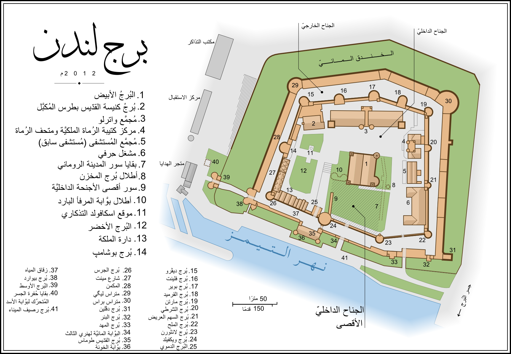 خارطة لبُرج لندن باللُغة العربيَّة